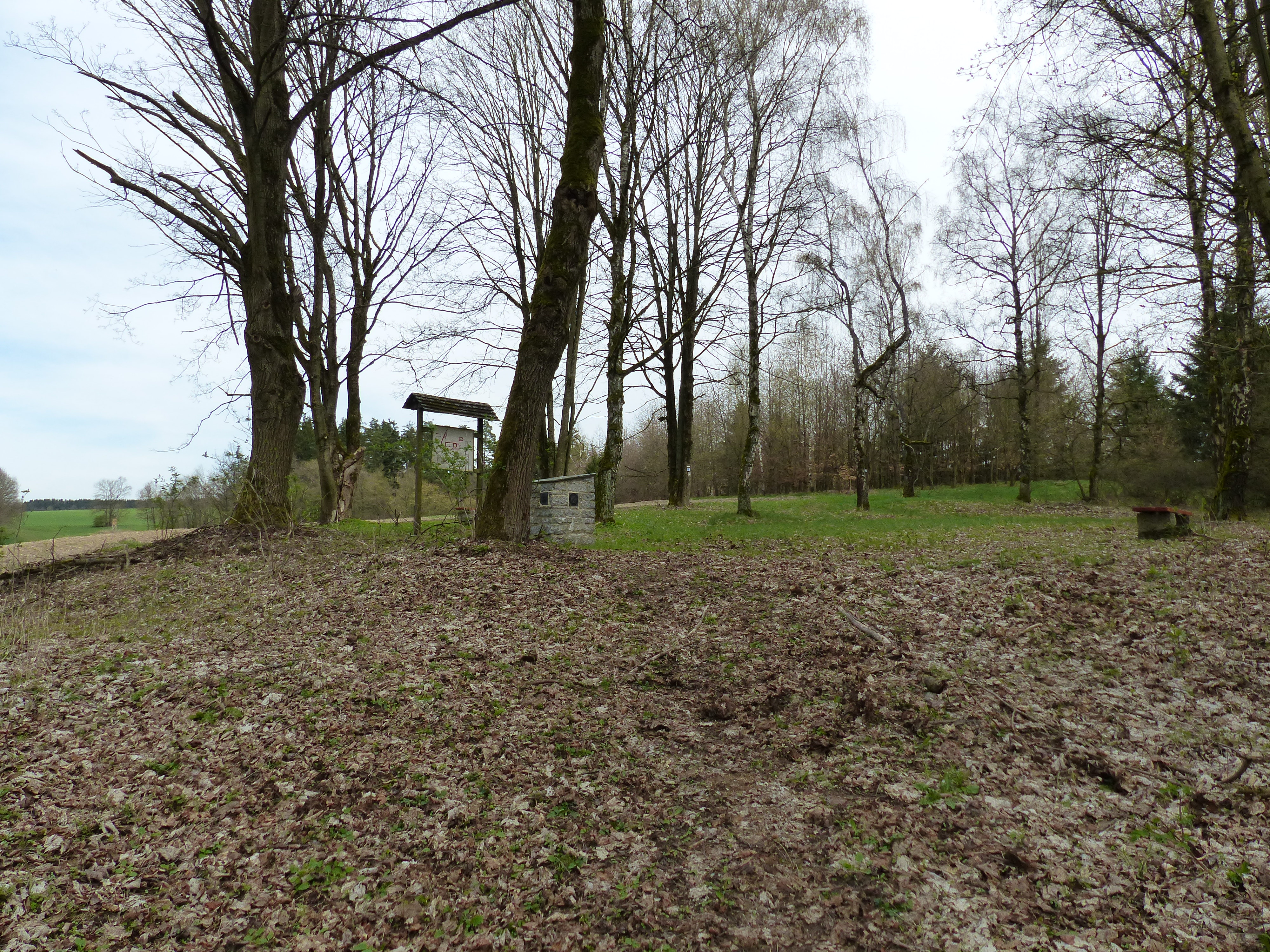 Fläche des Bodendenkmals der abgegangenen Leonhardskirche